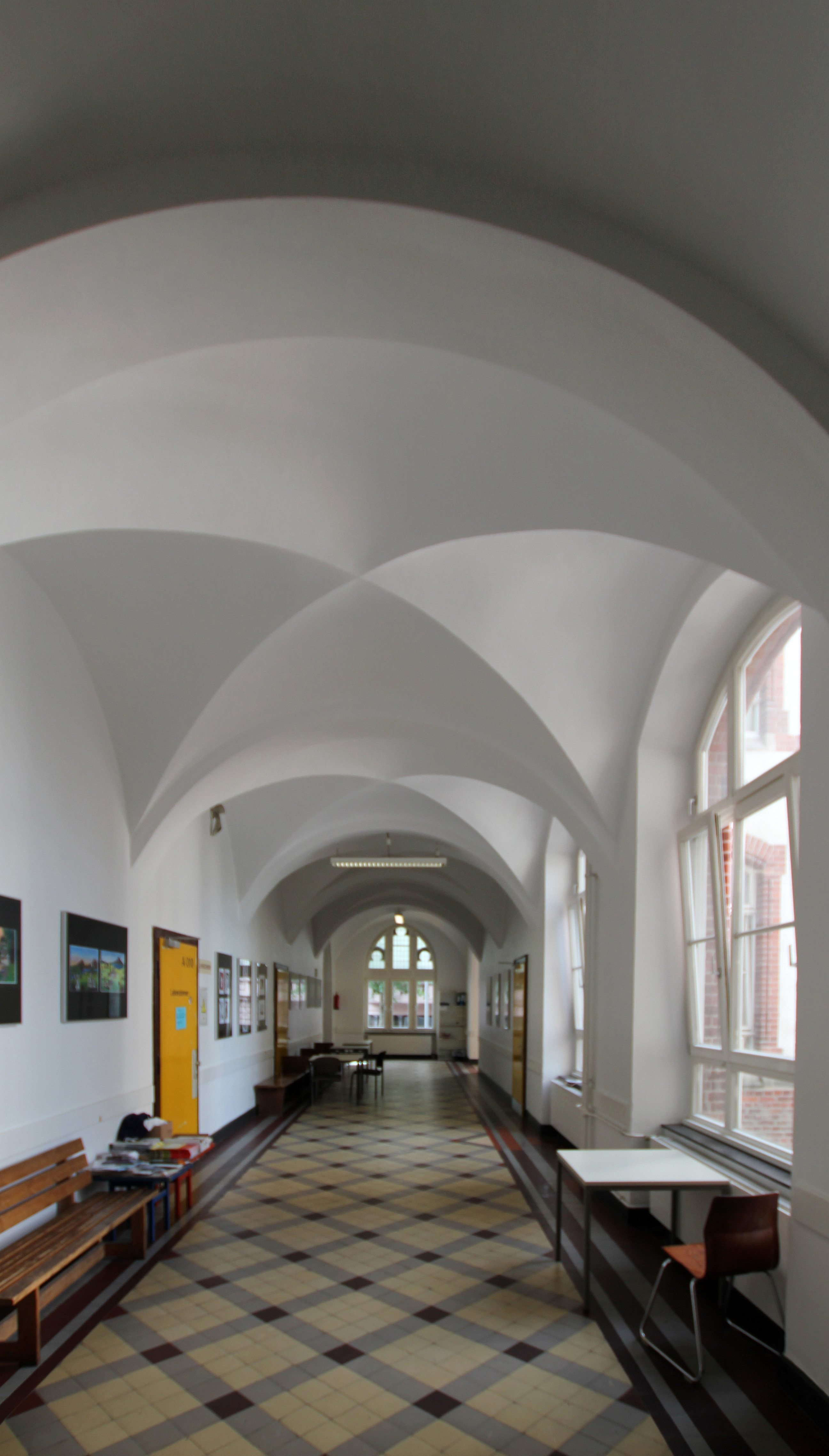 Köln-Neustadt-Nord, Hansagymnasium Hansaring 54-58 This is a photograph of an architectural monument.